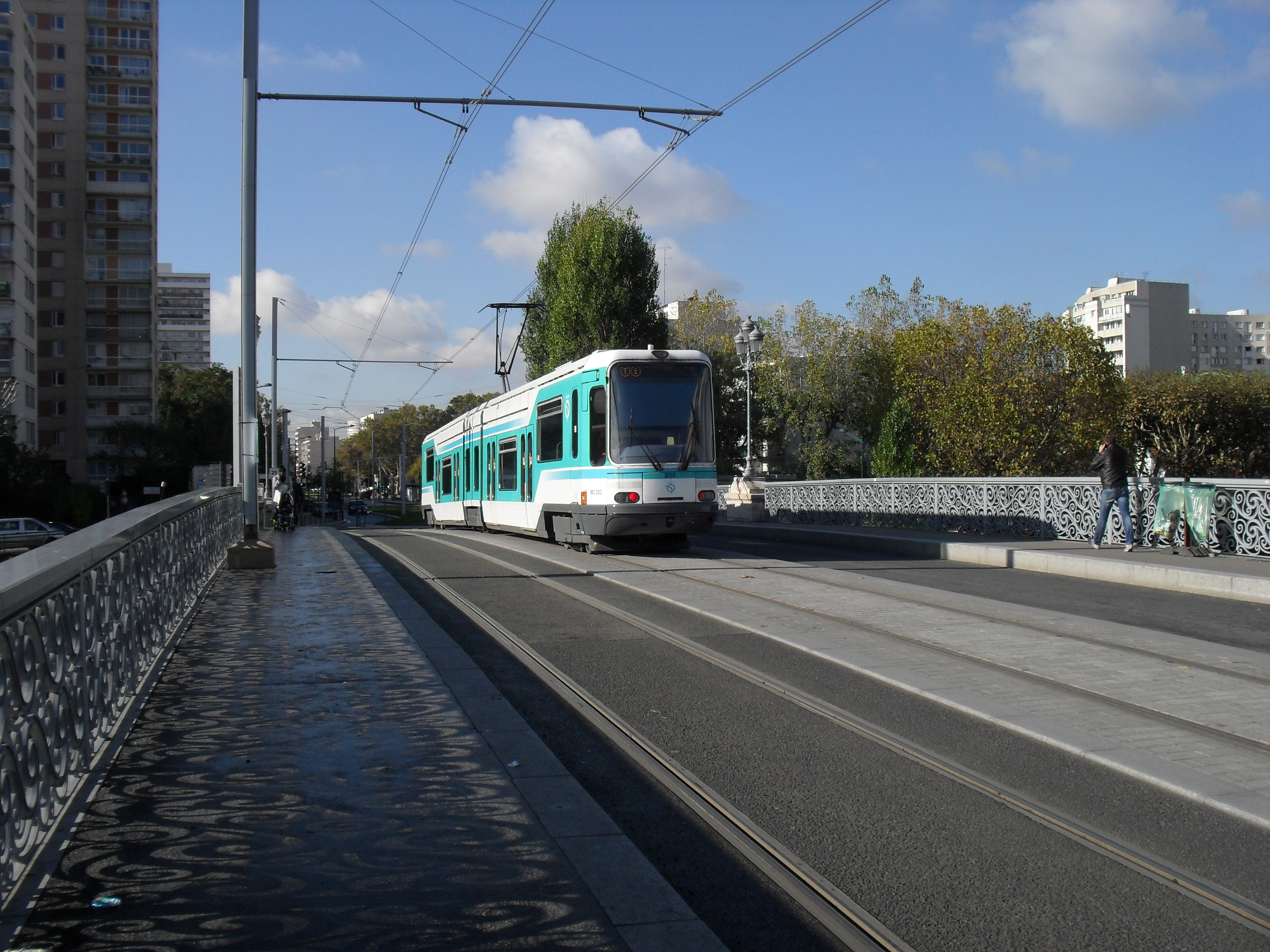 Paris Tramway ligne 1